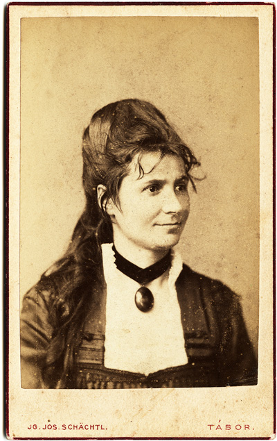 Kateřina Šechtlová, rozena Štastná.